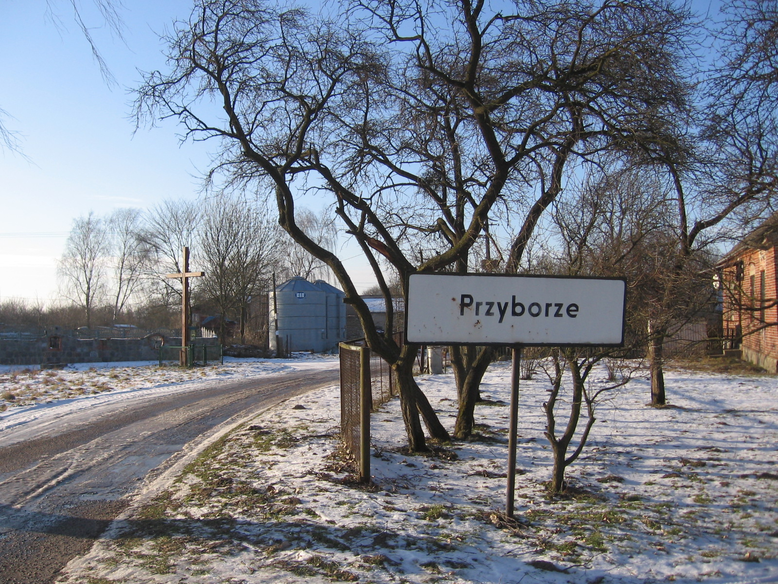 Wjazd do wsi Przyborze